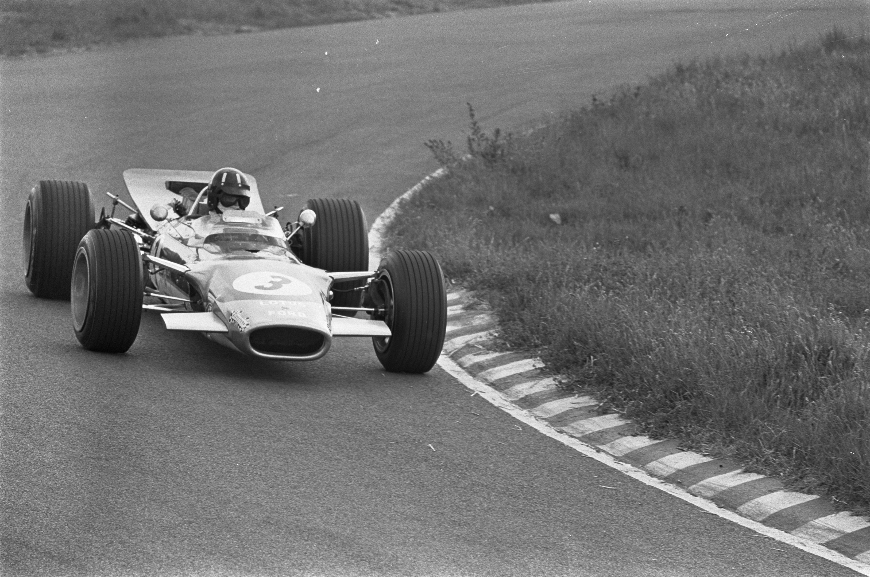 Collectie / Archief : Fotocollectie Anefo Reportage / Serie : [ onbekend ] Beschrijving : Grand Prix 68 Zandvoort . Graham Hill (Lotus-Ford) Datum : 23 juni 1968 Locatie : Zandvoort Trefwoorden : autosport Persoonsnaam : Surtees, John Fotograaf : Evers, Joost / Anefo Auteursrechthebbende : Nationaal Archief Materiaalsoort : Negatief (zwart/wit) Nummer archiefinventaris : bekijk toegang 2.24.01.05 Bestanddeelnummer : 921-4607